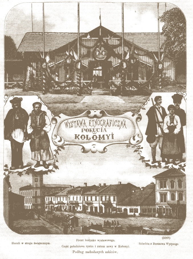 Folder reklamowy wystawy etnograficznej z roku 1880, zorganizowanej przez oddzial Towarzystwa Tatrzańskiego w Kolomyi, "Huculszczyzna"